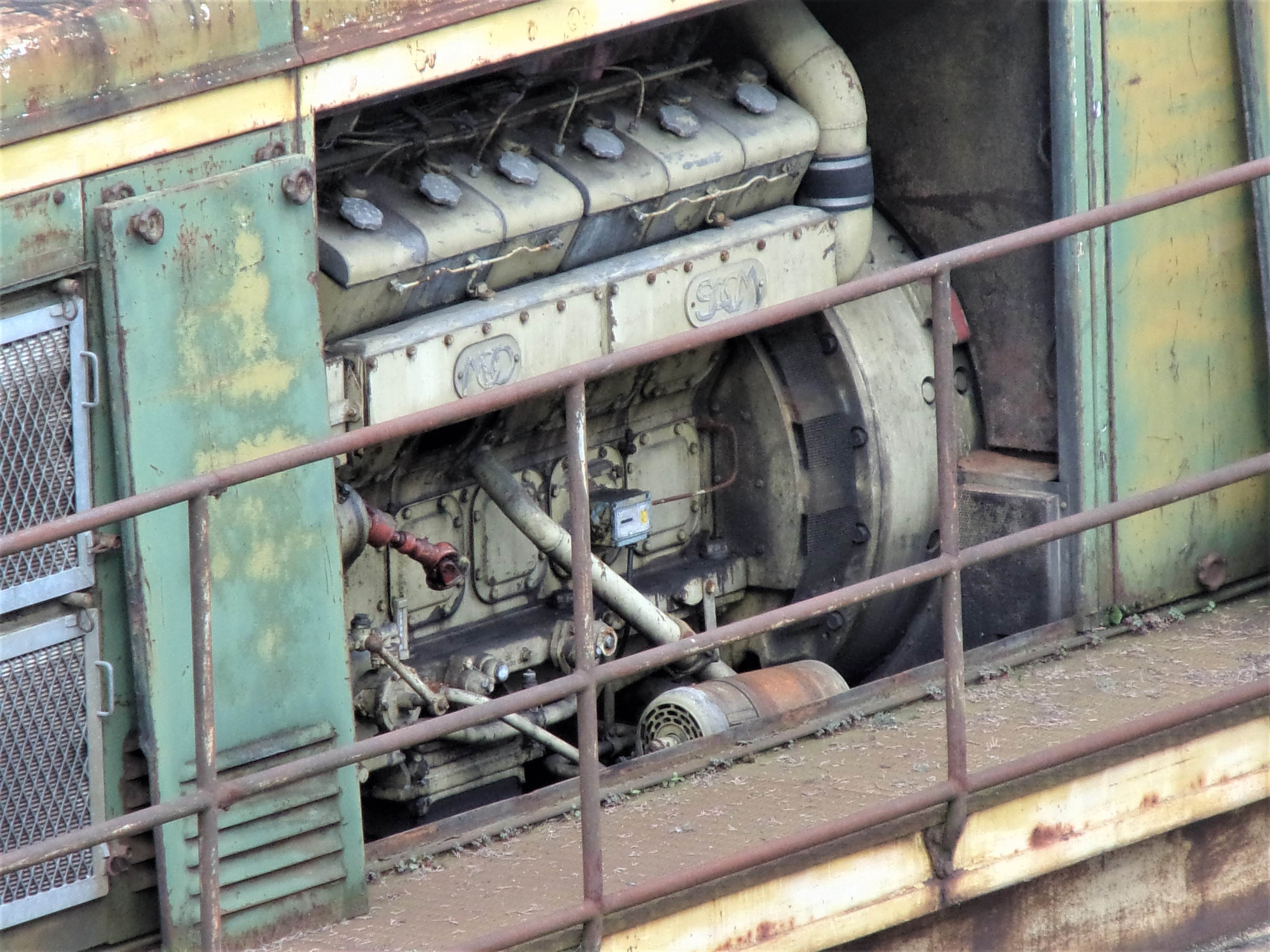 Moteur MGO V12 de la BB 63584 réformée à Saint-Pierre-des-Corps.